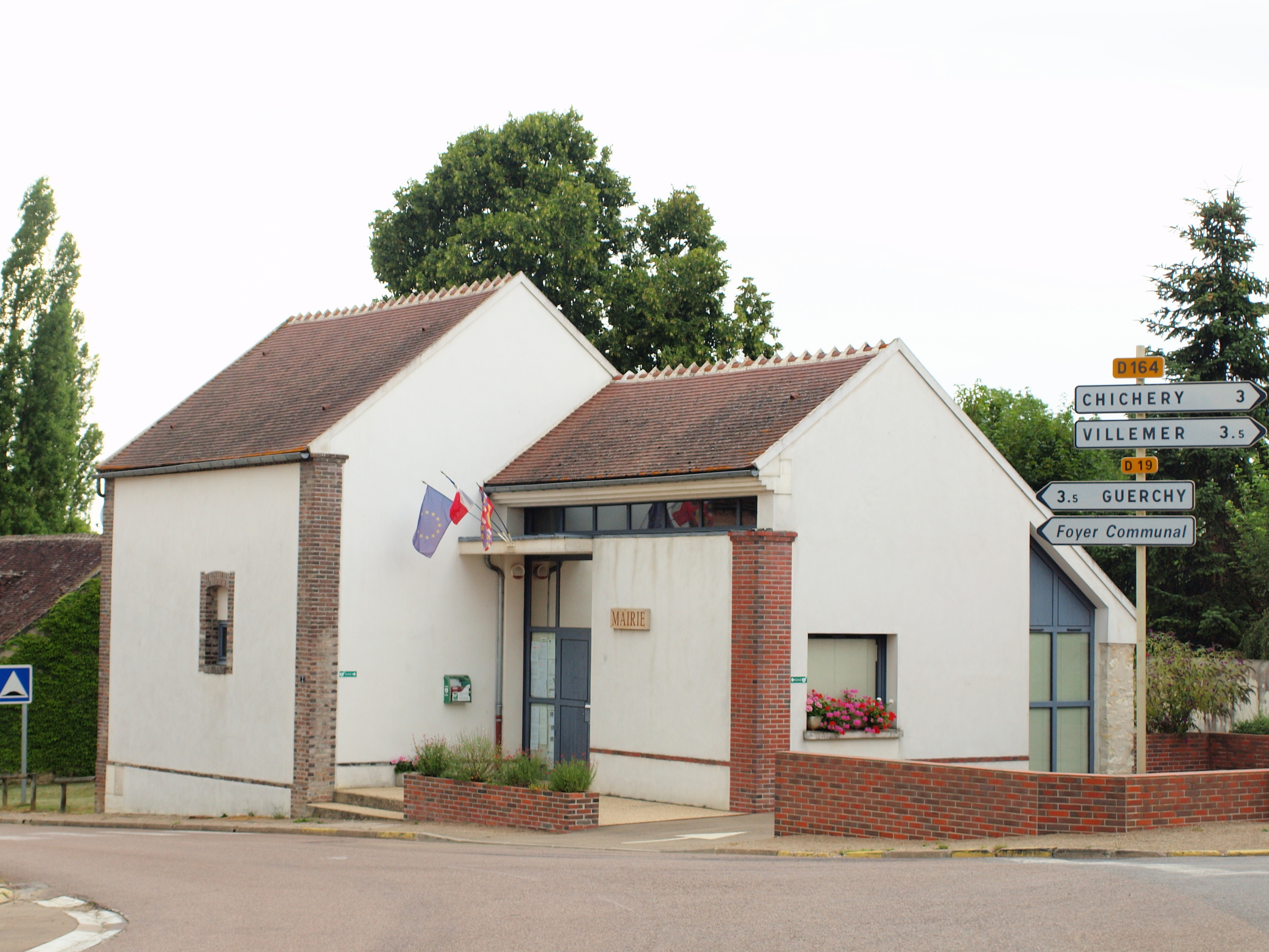 Branches (Yonne, France)